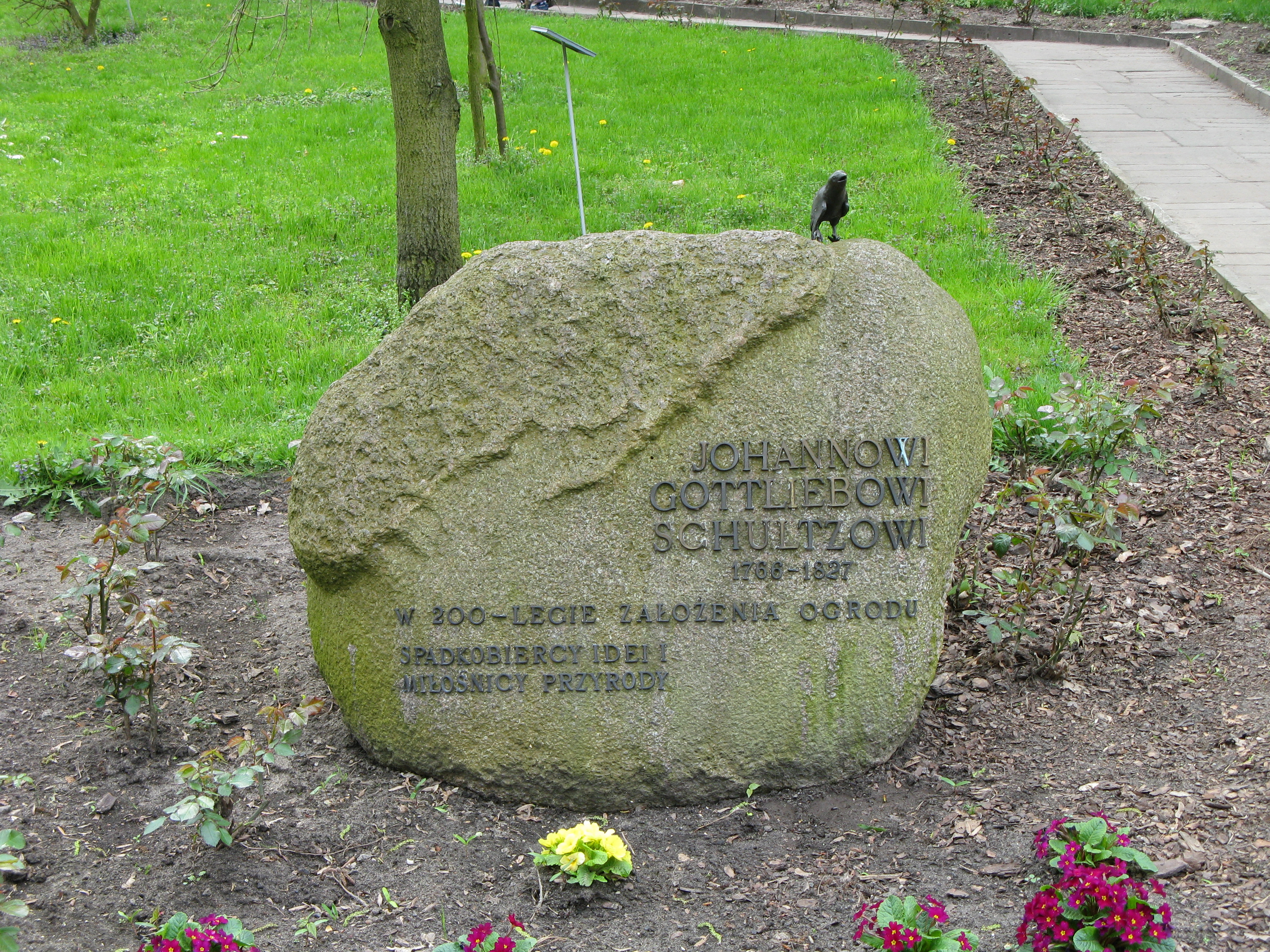 Johann Gottlieb Schultz Memorial in Toruń